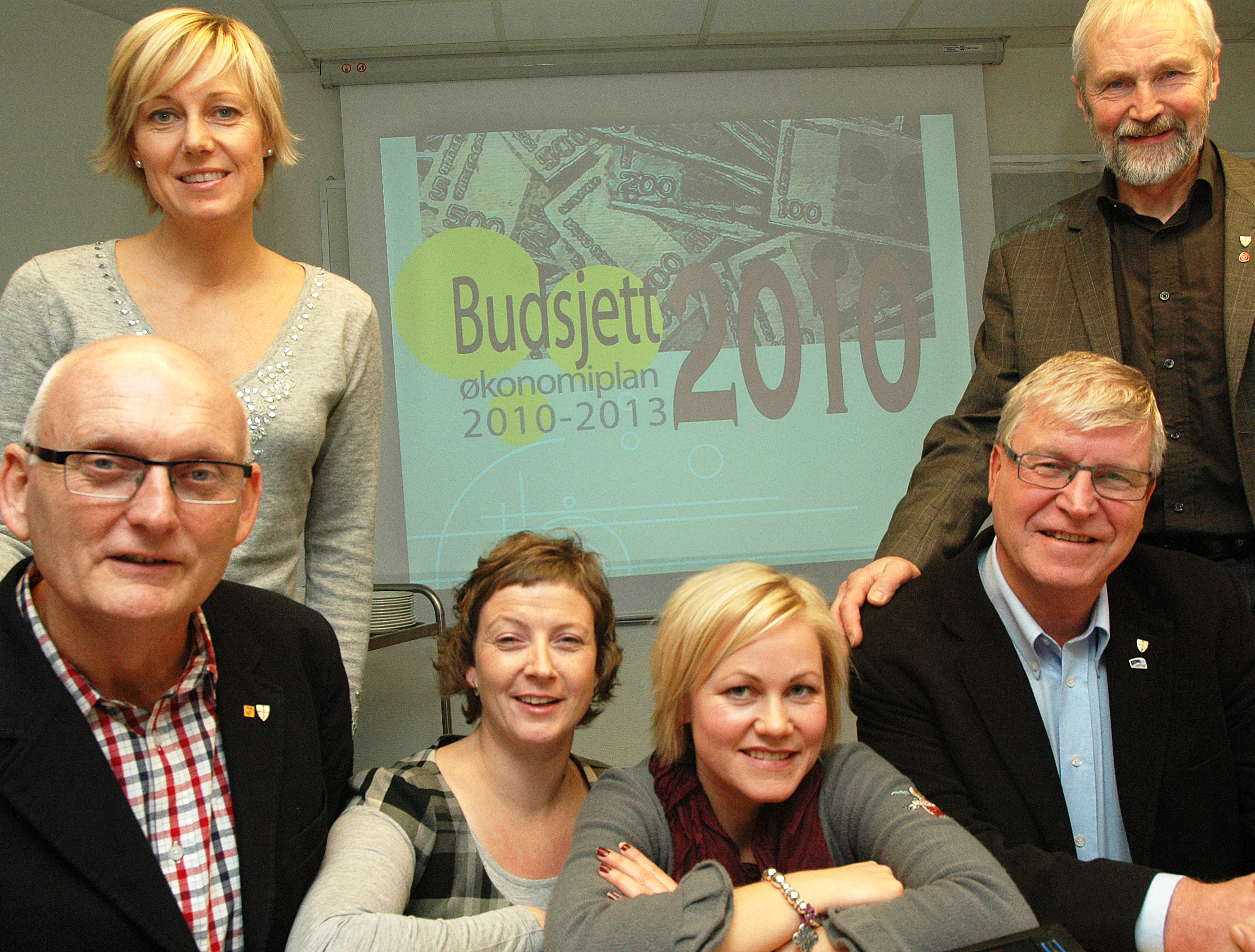 Fylkesrådet i Nord-Trøndelag på pressekonferansen for budsjettet 2010. Foran fra venstre: Johannes Sandstad, Annikken Kjær Haraldsen, Ingvild Kjerkol og Tor Erik Jensen. Bak: Anne Marit Mevassvik og Alf Daniel Moen.